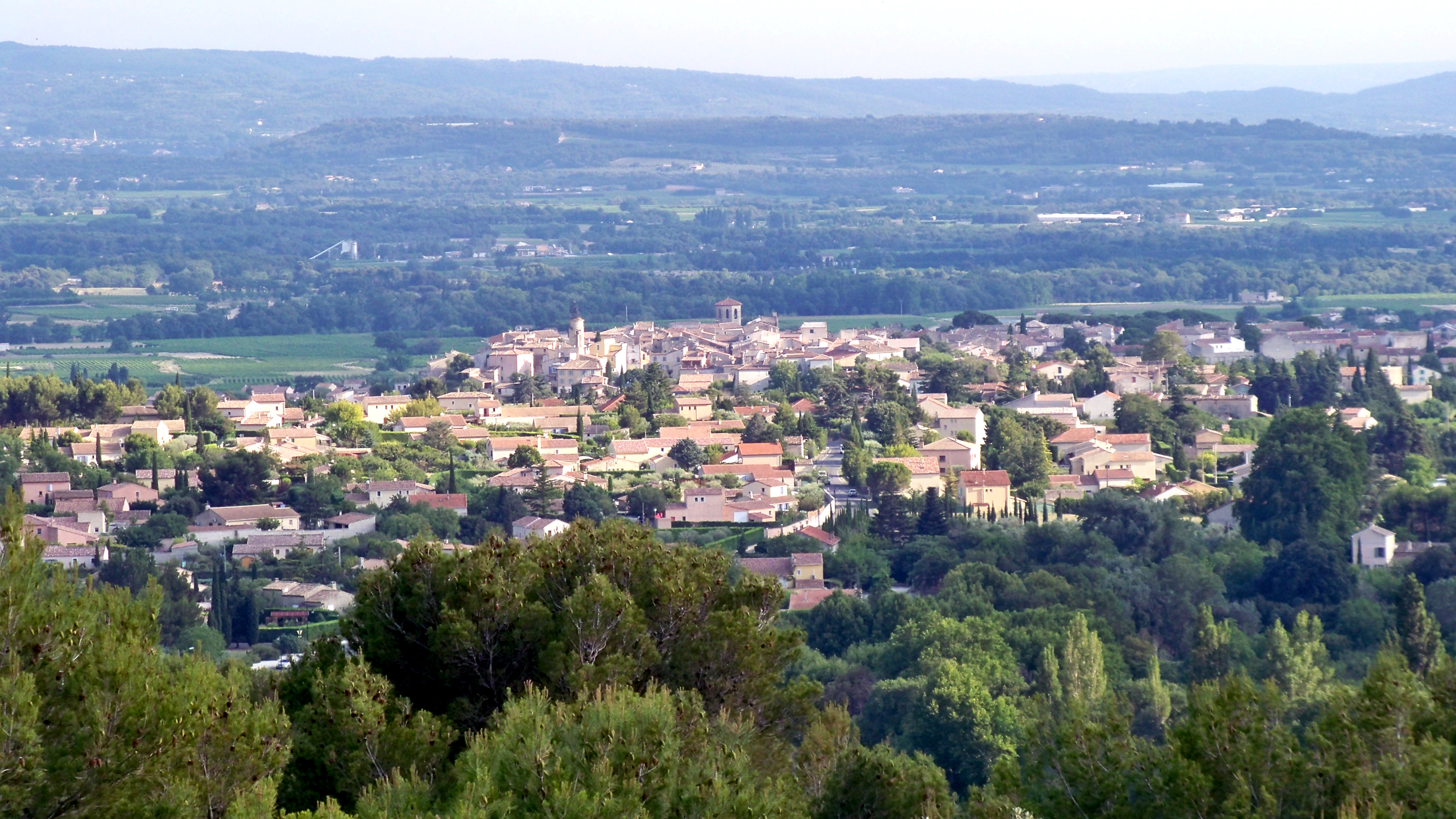 Village de Caromb, Vaucluse, France